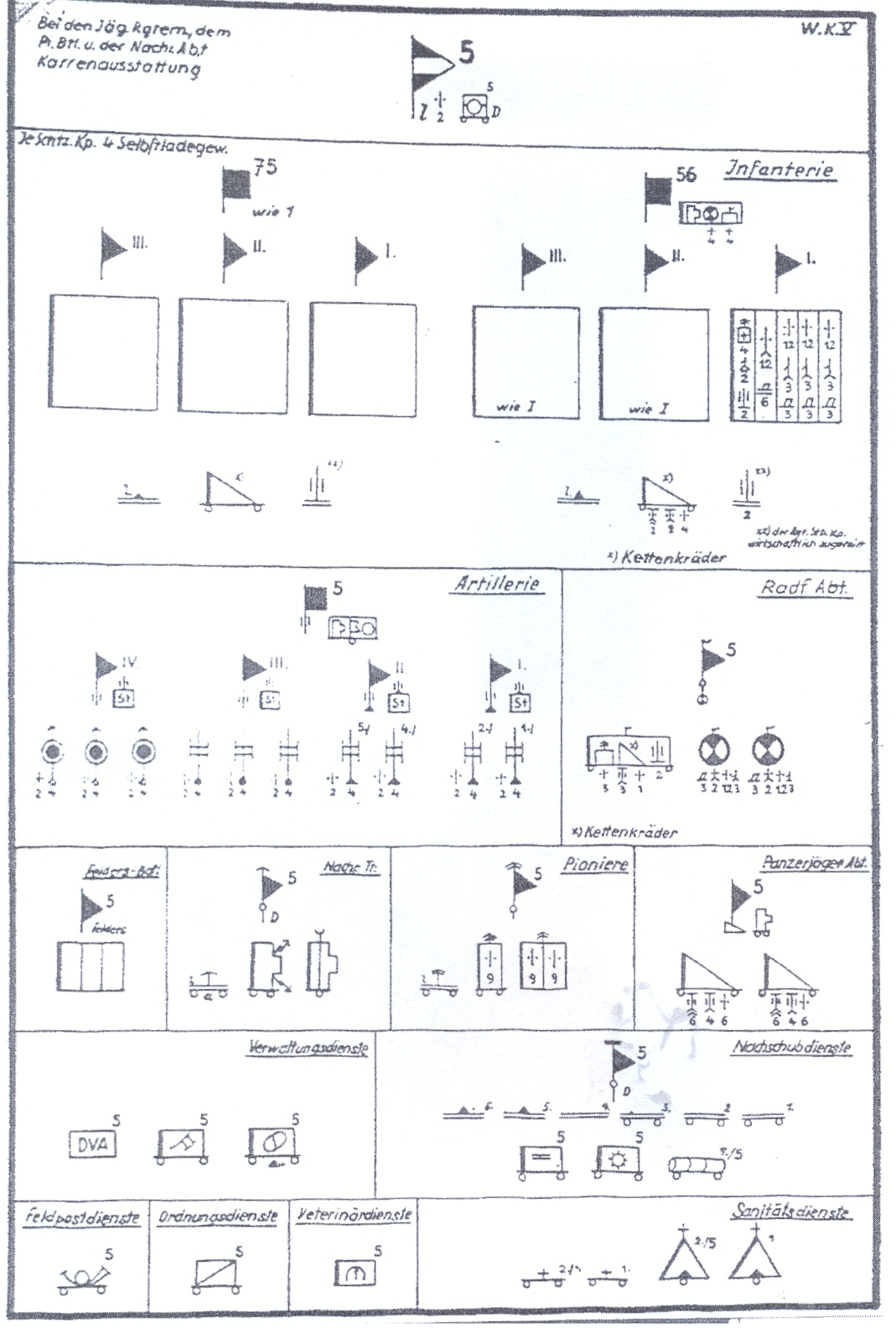 Gliederung der 5. Jäger-Divivion der Wehrmacht 1942